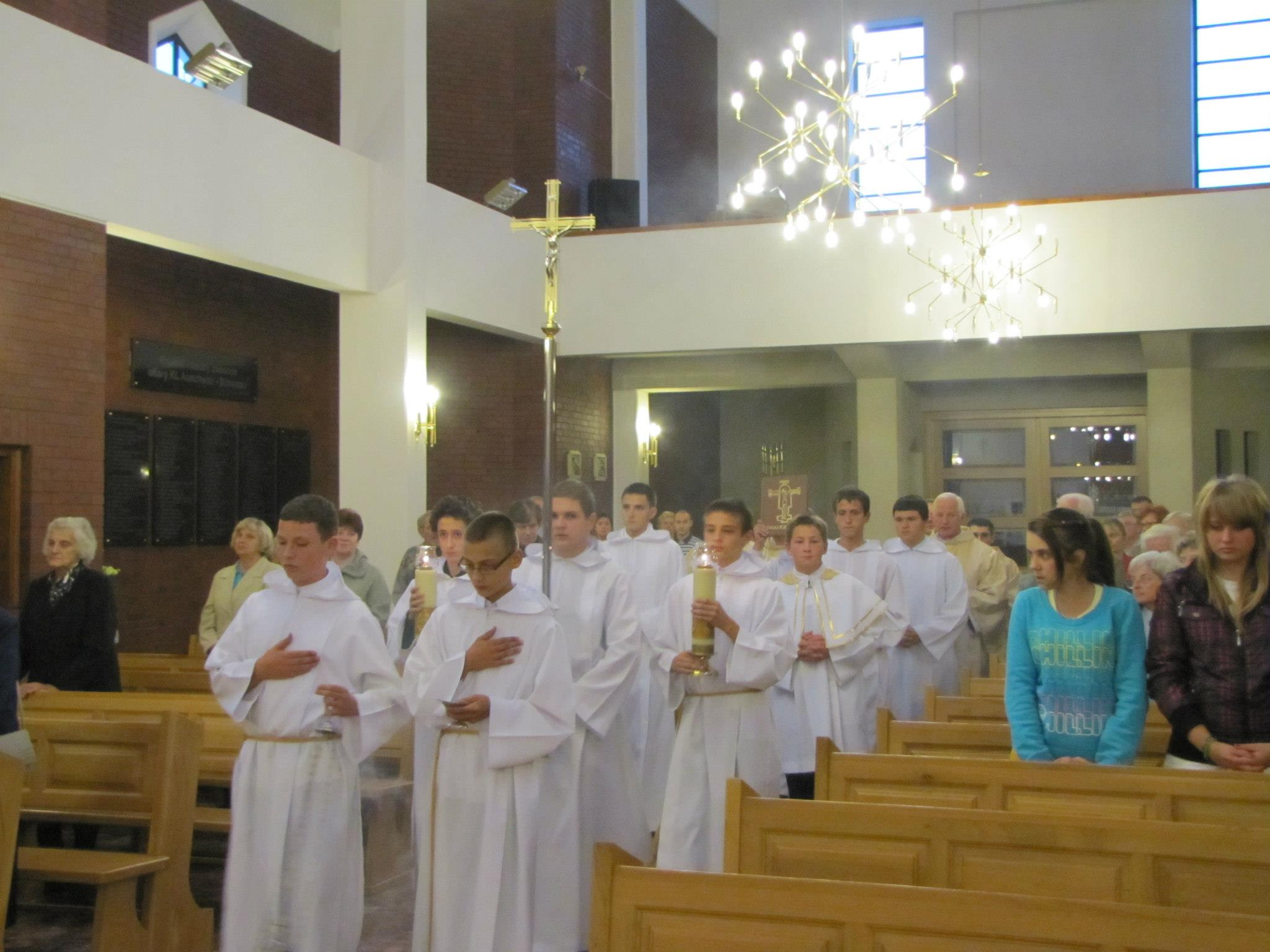 Uroczystość św. Franciszka w Harmężach